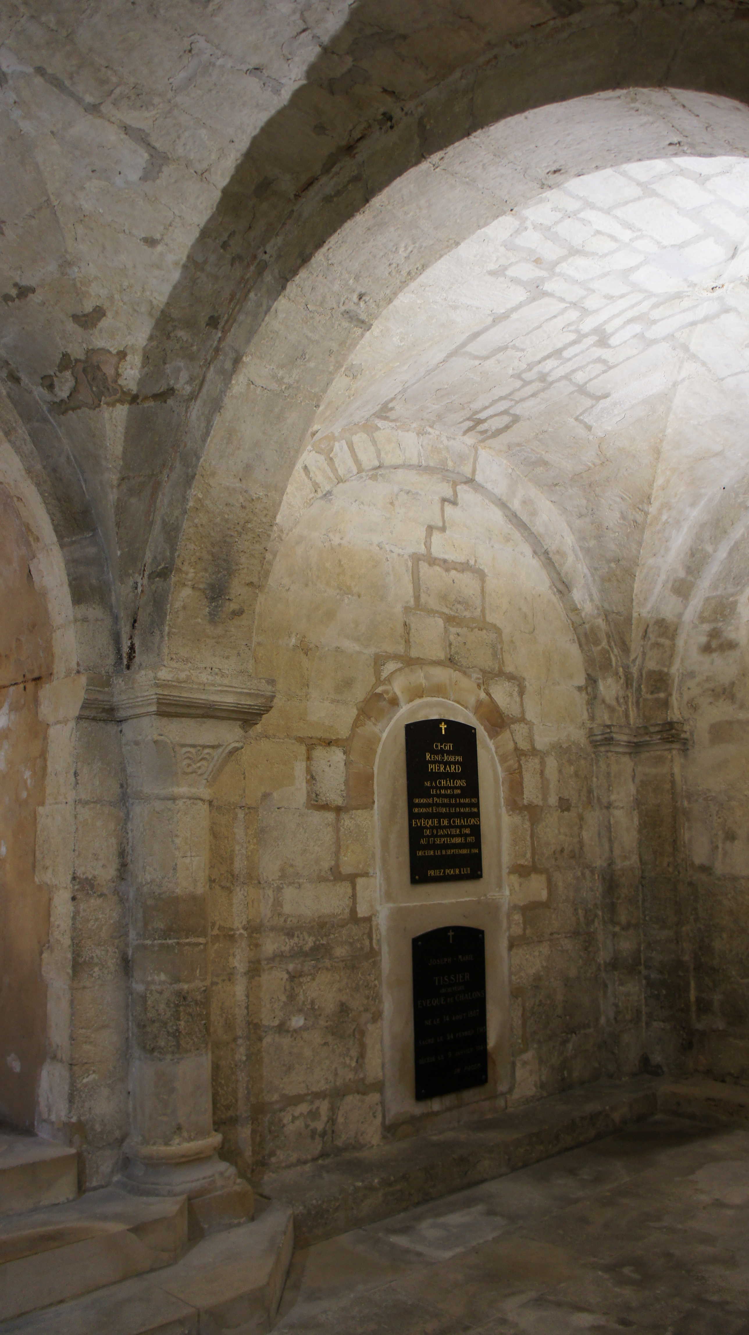 dans la cathédrale de Châlons.